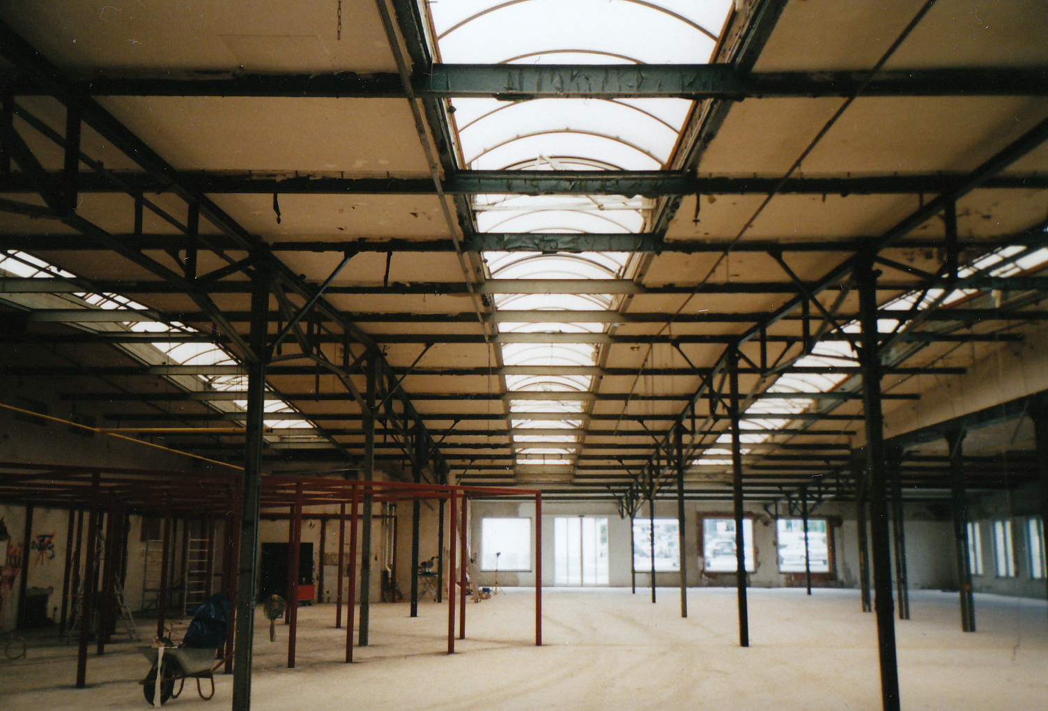 Werkhalle der früheren "Union-Werke" Radebeul mit Stahlkonstruktion von 1927 während der Sanierung durch das "Autohaus Kuntzsch" (2008).